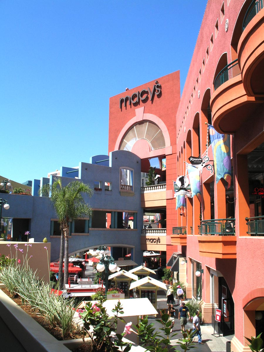 Horton Plaza, San Diego, California, USA